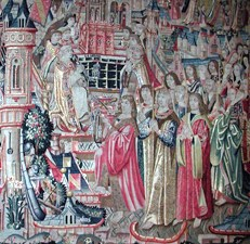 Photographie d'une partie d'une tapisserie de 1506, conservée au musée de Bruges. Elle représente le siège mis devant Dole (Jura), en 1479, sur l'ordre du roi de France Louis XI.